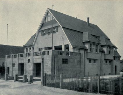 Schwabenhaus, Heilbronn, Badstr. 48